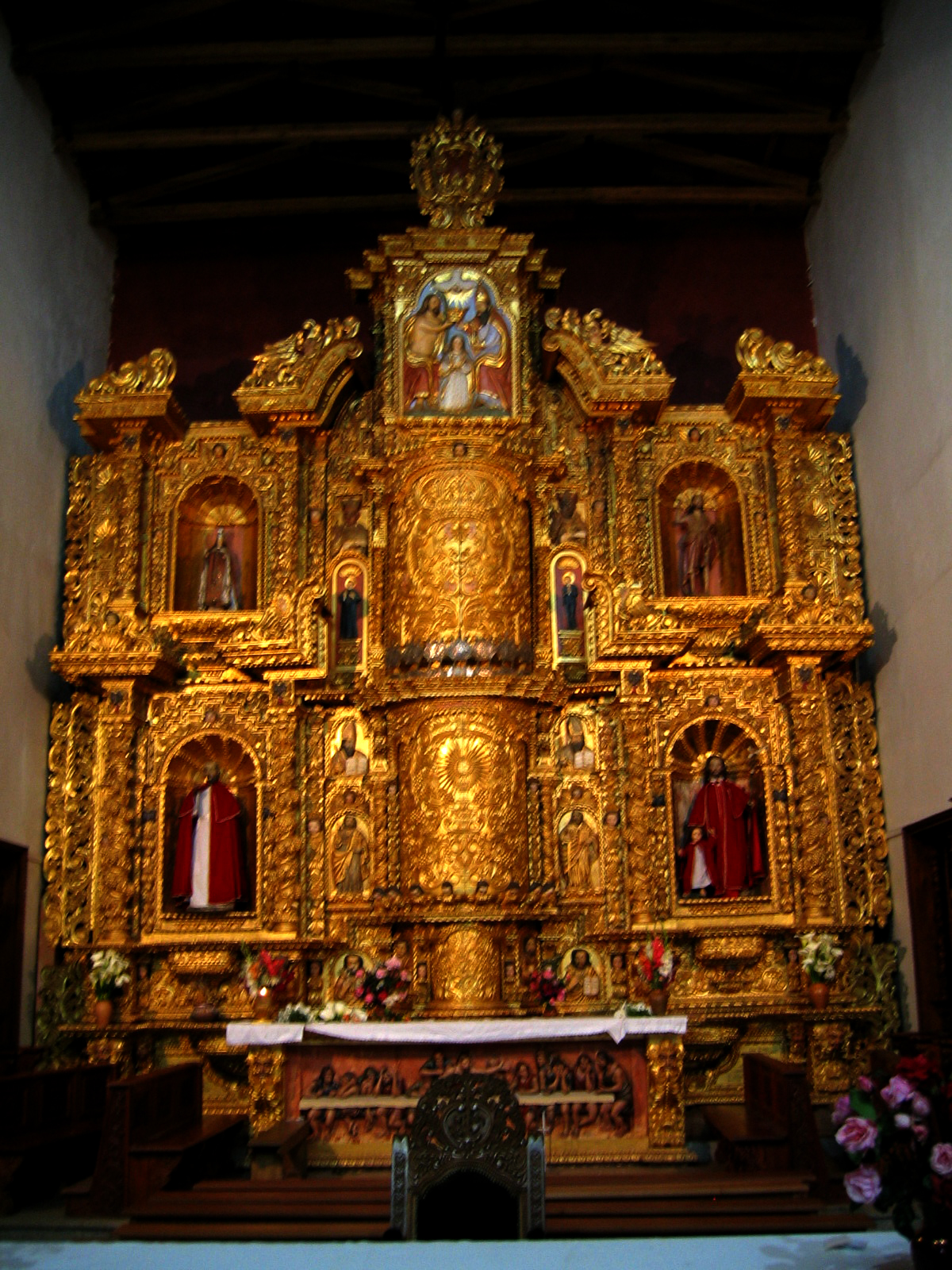 Retablo del S. XVIII, construido con cedro importado de NIcaragua.